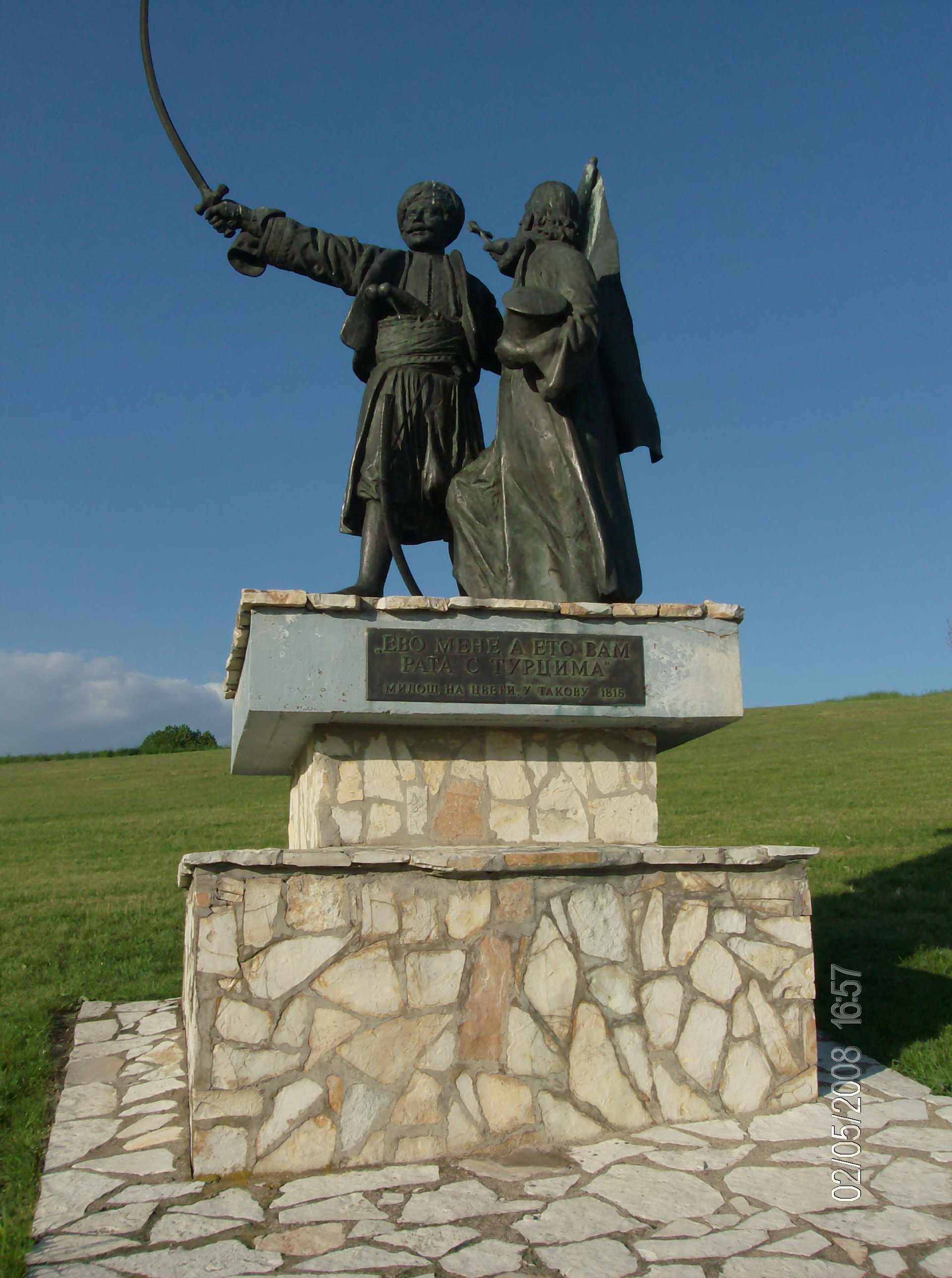 SpomenikDrugiSrpskiUstanak